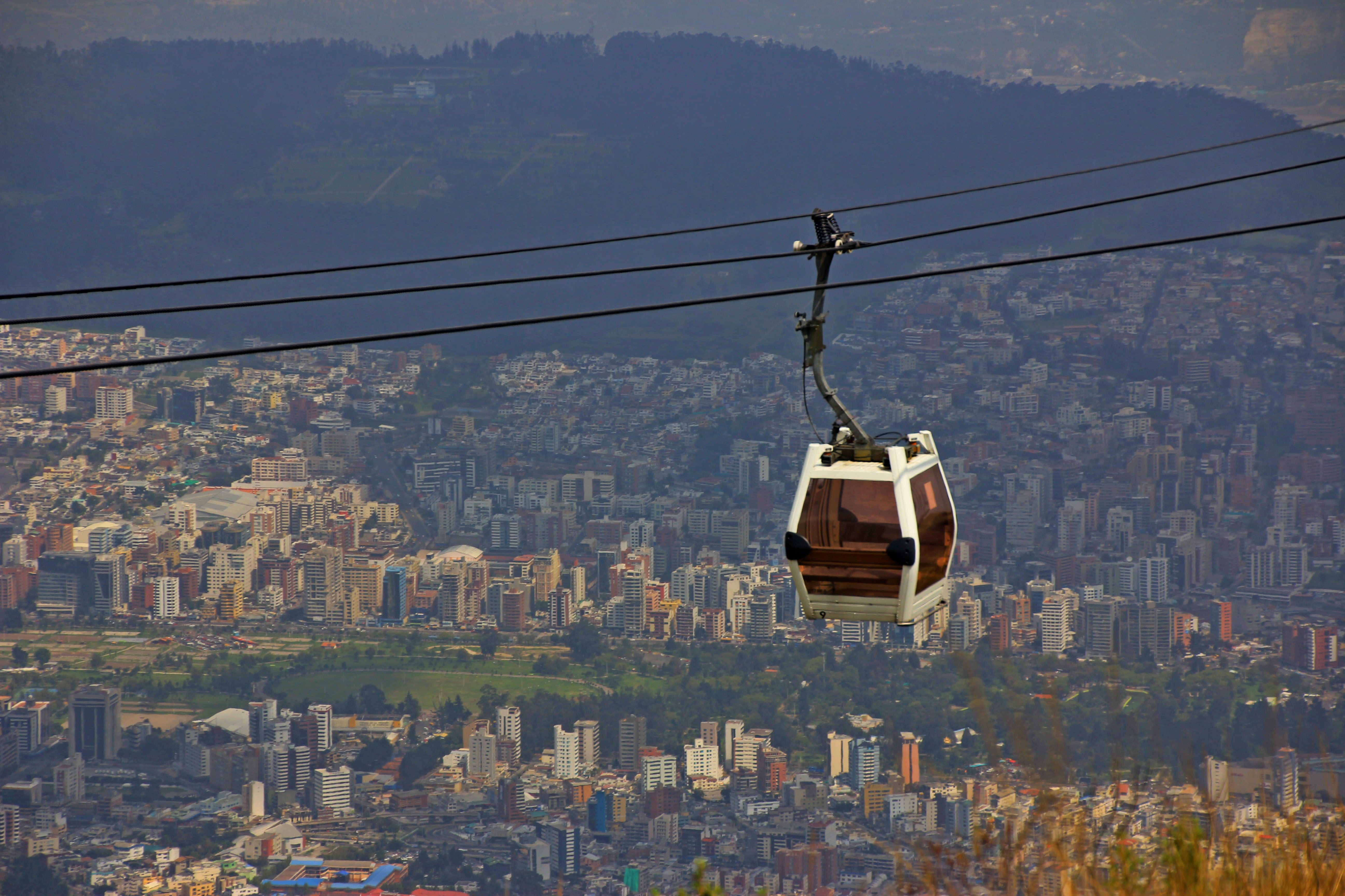 Quito y su teleférico